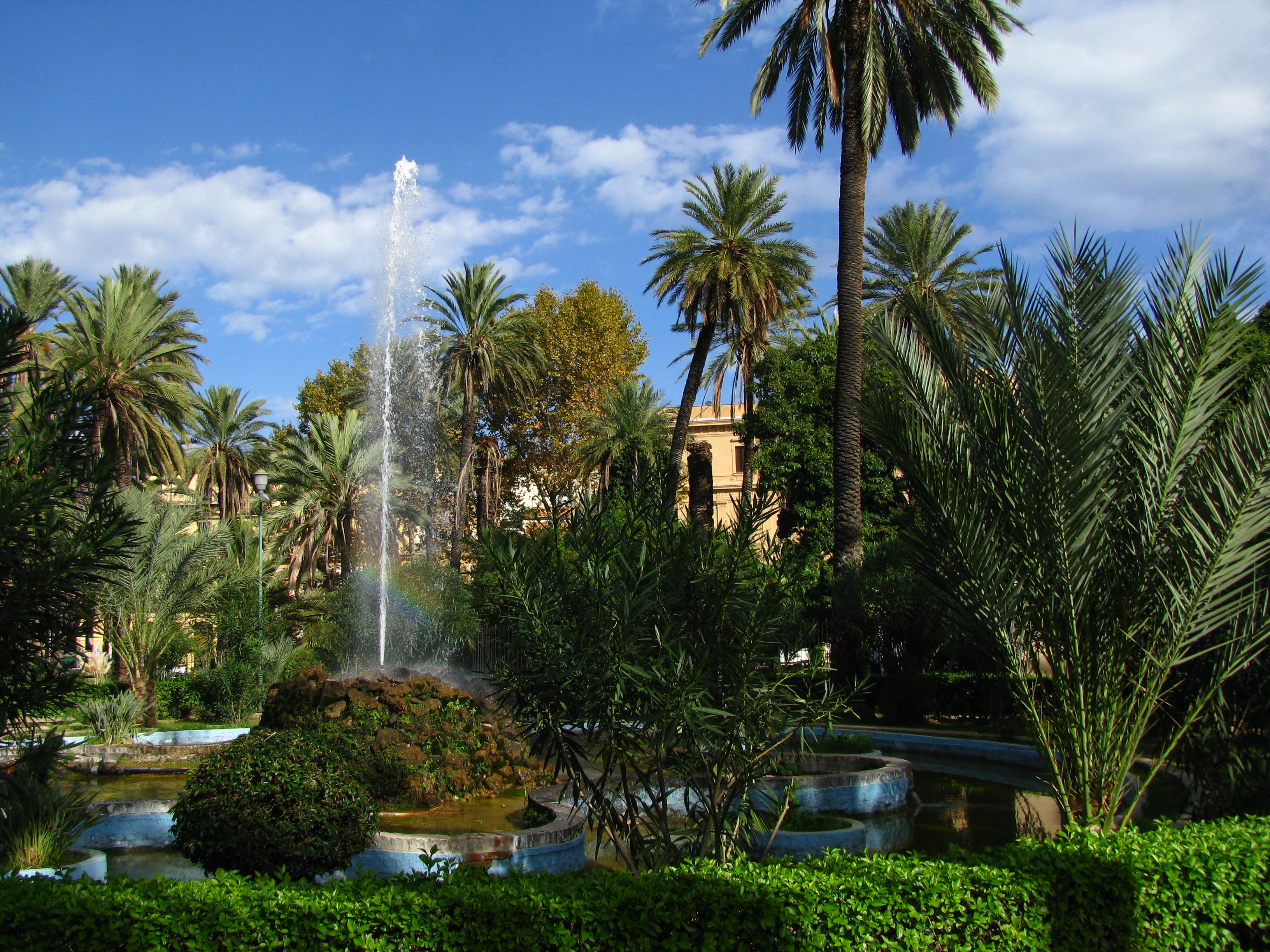 675 - Palermo, Piazza della Vittoria